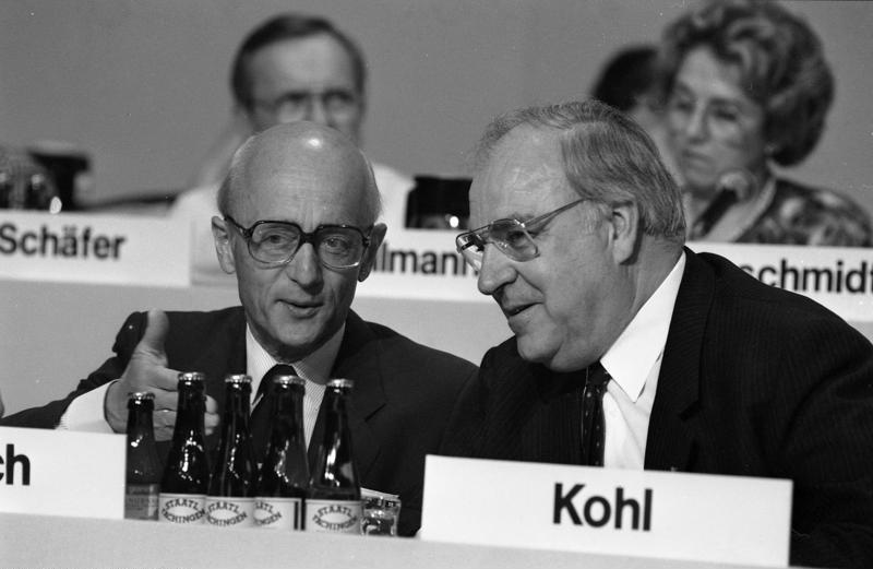 13.06. - 15.06.1988 36. CDU-Bundesparteitag in der Rhein-Main-Halle in Wiesbaden